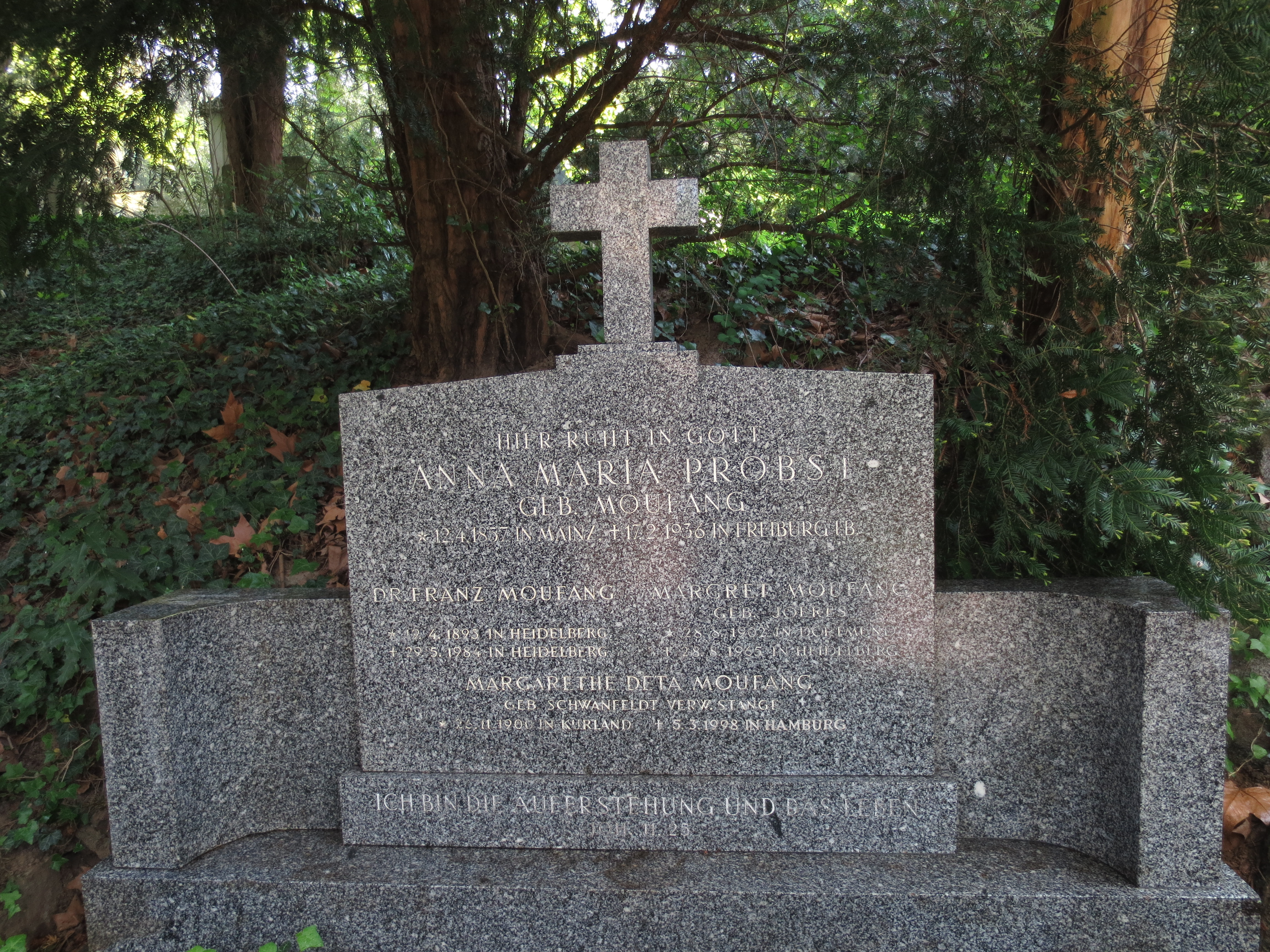 Bergfriedhof Heidelberg, Familiengrab Dr. Franz Moufang